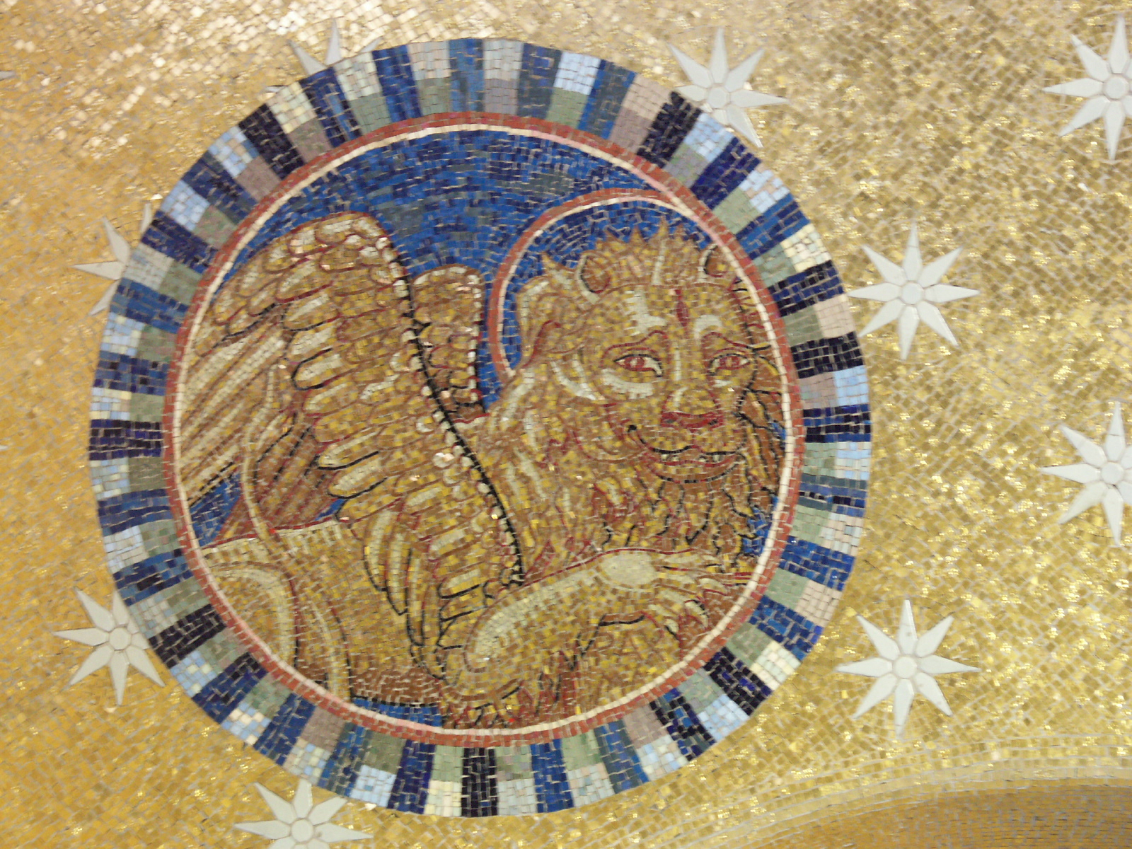 Mont Sainte-Odile, Alsace, France - Lion of Saint Mark